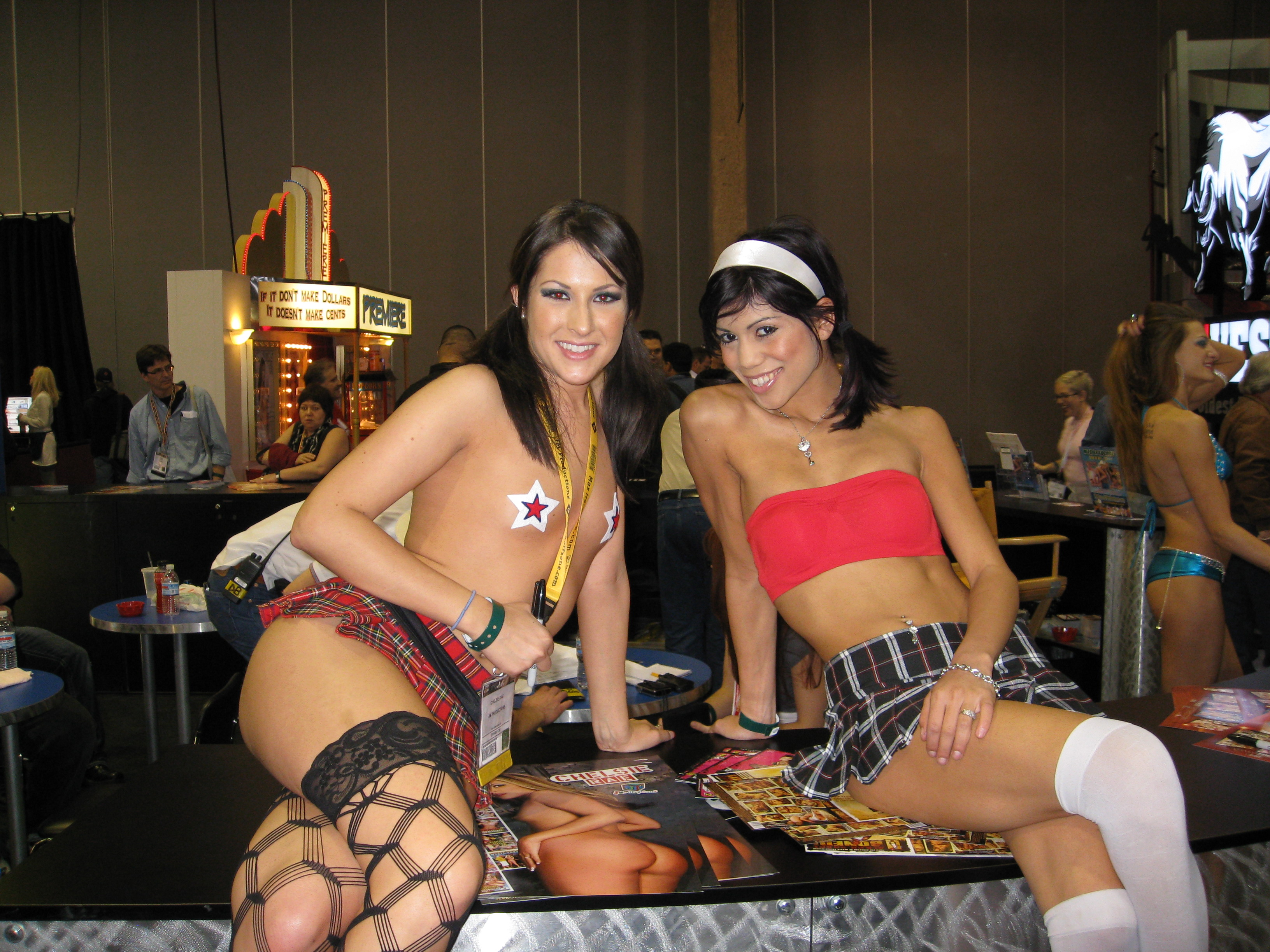 AEE2008_Day1 050